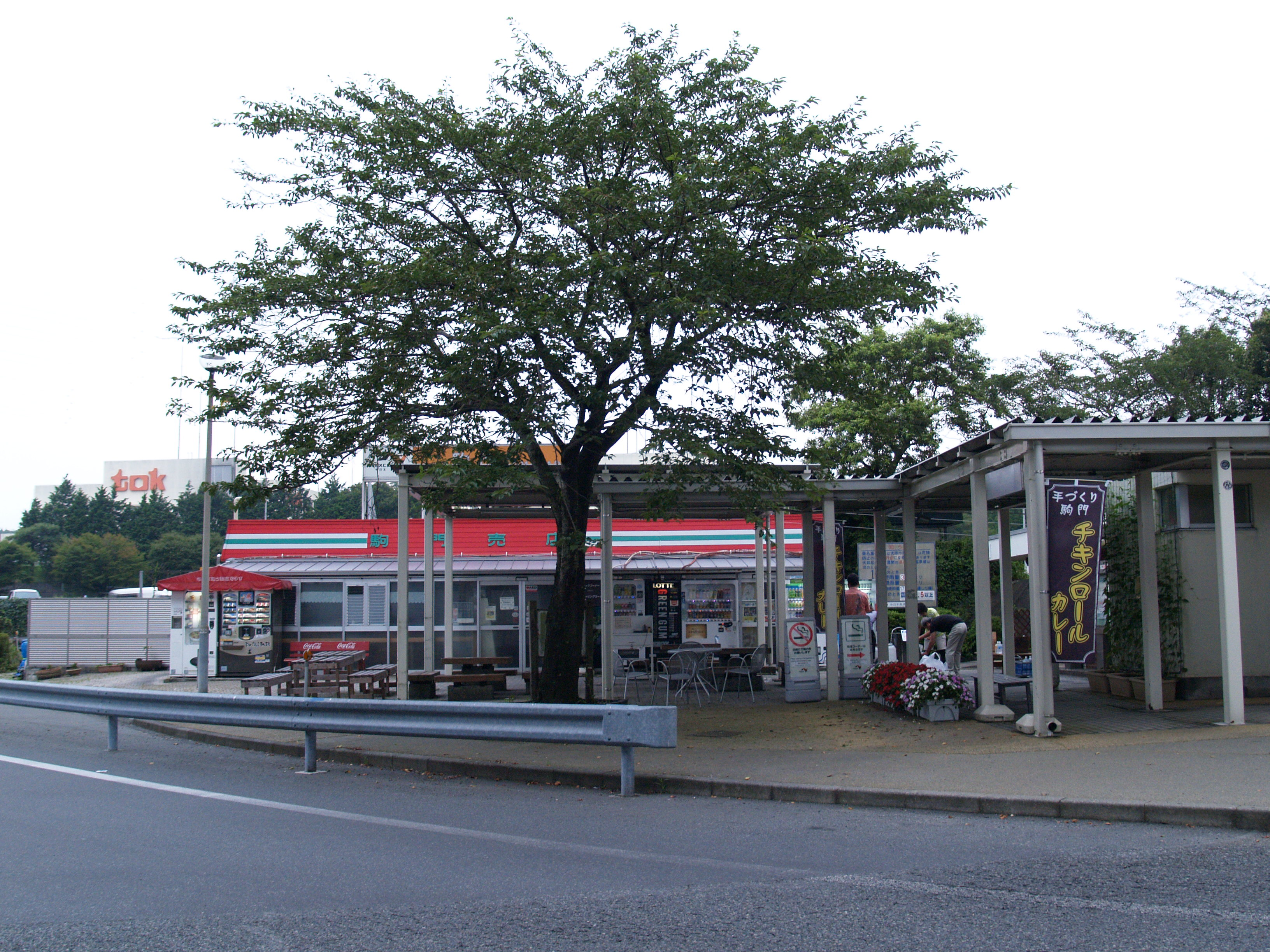 駒門パーキングエリア下り線施設